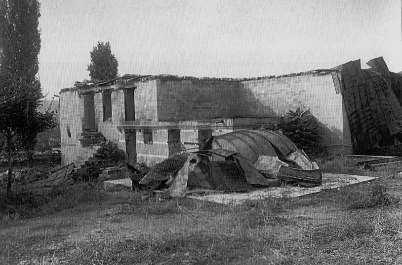 “İmamlı məscidi”, İmamın türbəsi və Axund Ağa Mirmehdinin qəbri